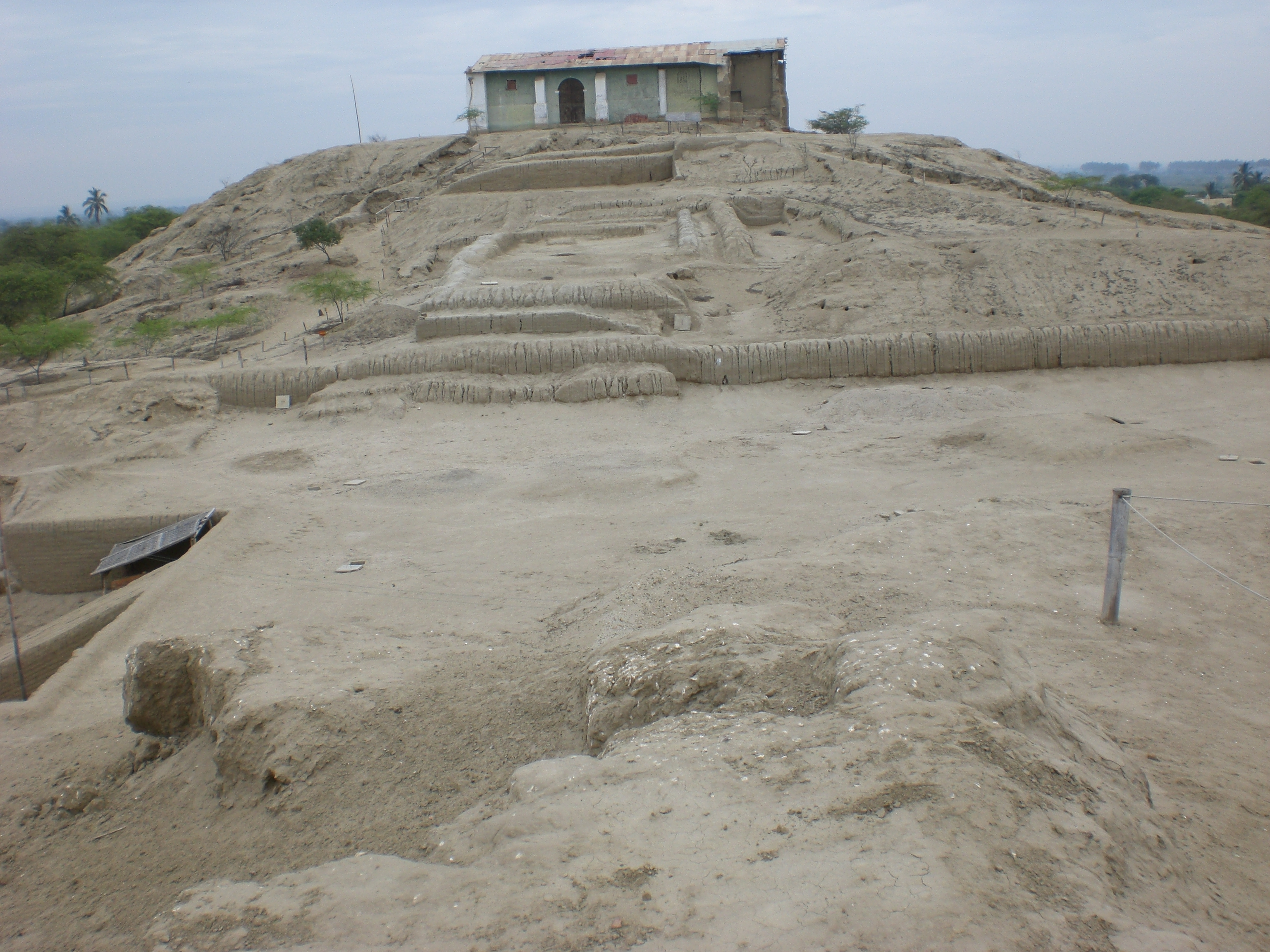 Narihualá (südlich von Piura / Catacaos)